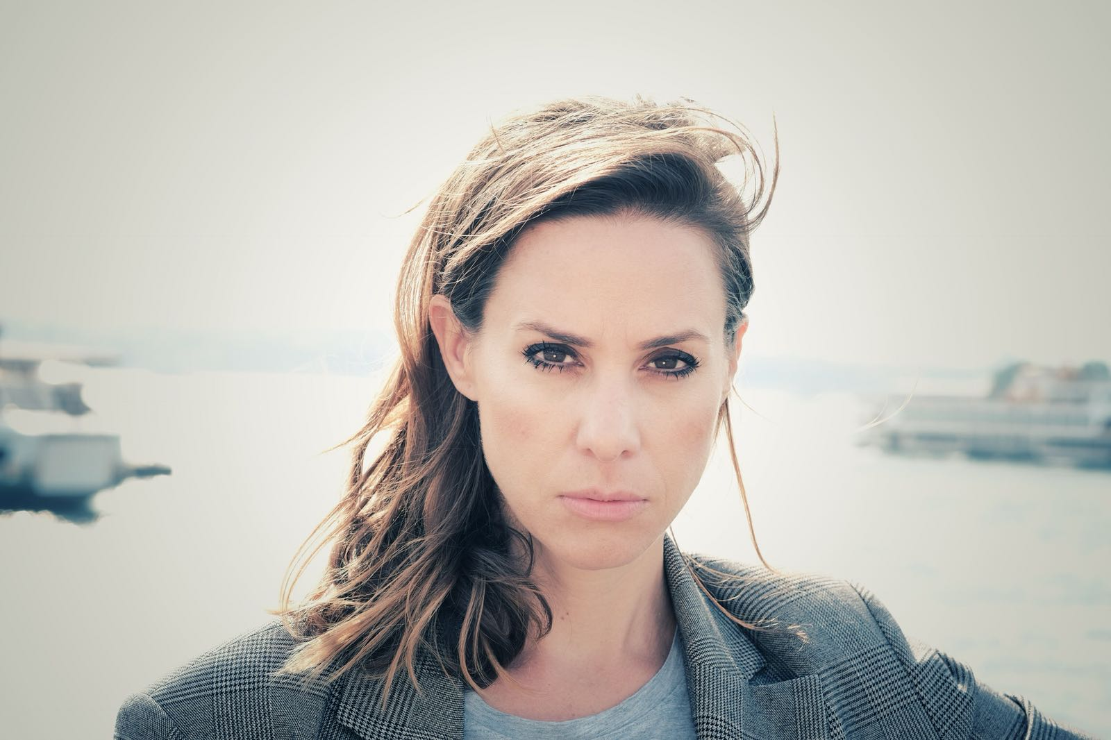 Portrait von Natalie Amiri